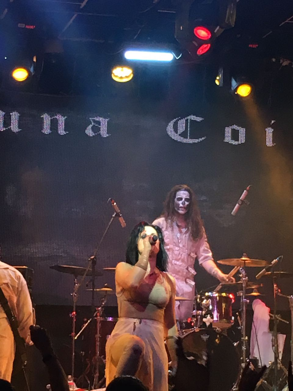 לקונה קויל בישראל - הזמרת קריסטינה סקאביה והמתופף בלבוש והאיפור המסורתיים שלהם